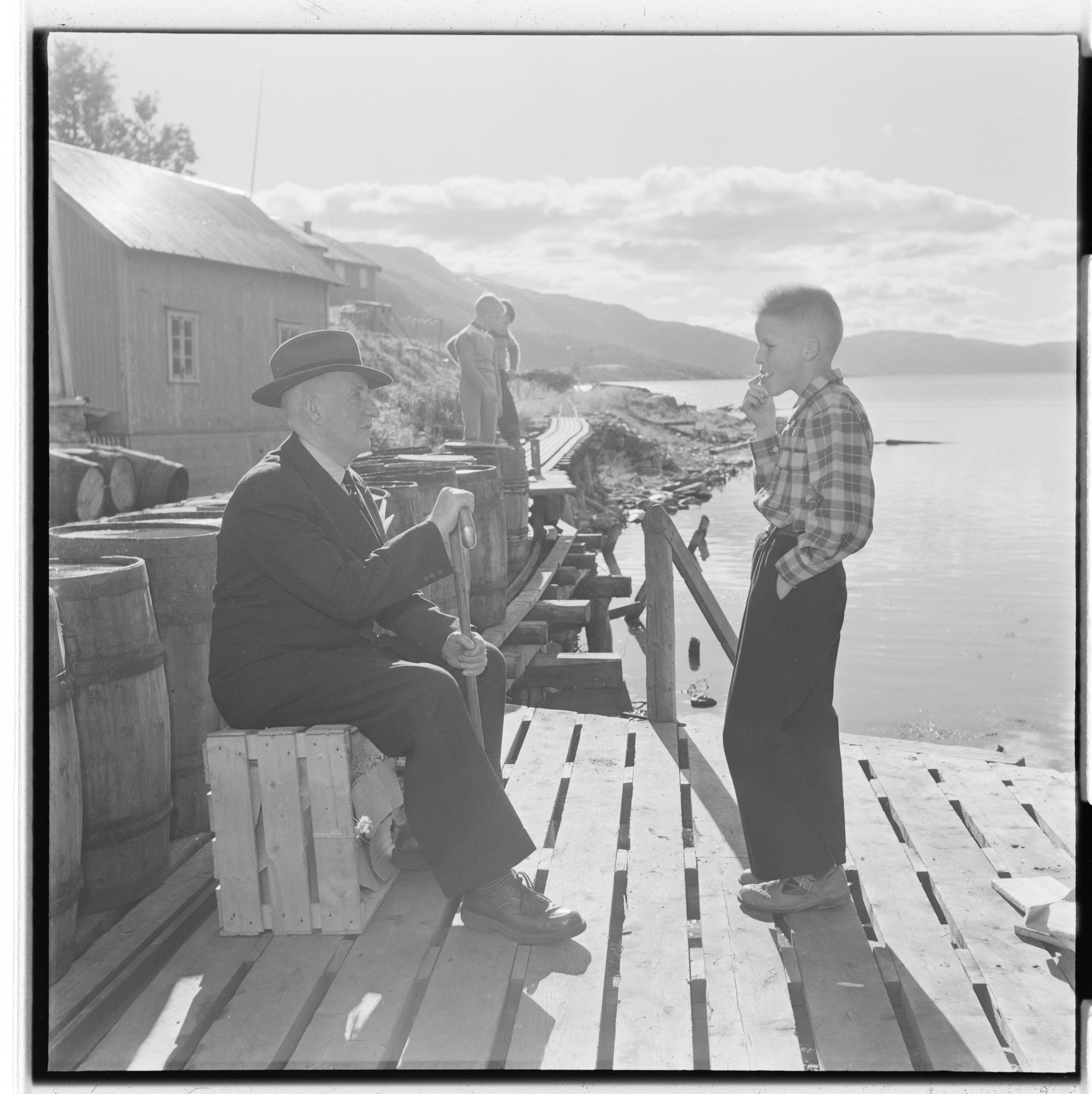 Bildet er hentet fra Arkivverket. Foto tatt i forbindelse med markering av Lars Aagaard Meyer-jubileum i Mo i Rana i 1954. NÅ nr. 21, 1954 Arkivinstitusjon : Riksarkivet Arkivnavn : Billedbladet NÅ Sted : Norge, Nordland, Rana, Mo Emneord: Handelsmenn, Jubileum, Barn, Menn, Brygger Avbildet: Trolig Carsten Smith Meyer, født 22. august 1877 som sønn av Lars Meyer (jamfør bilde på side 102 i Hundre års handel i Nord-Norge : L.A. Meyer, Mo i Rana : 1854-1954)